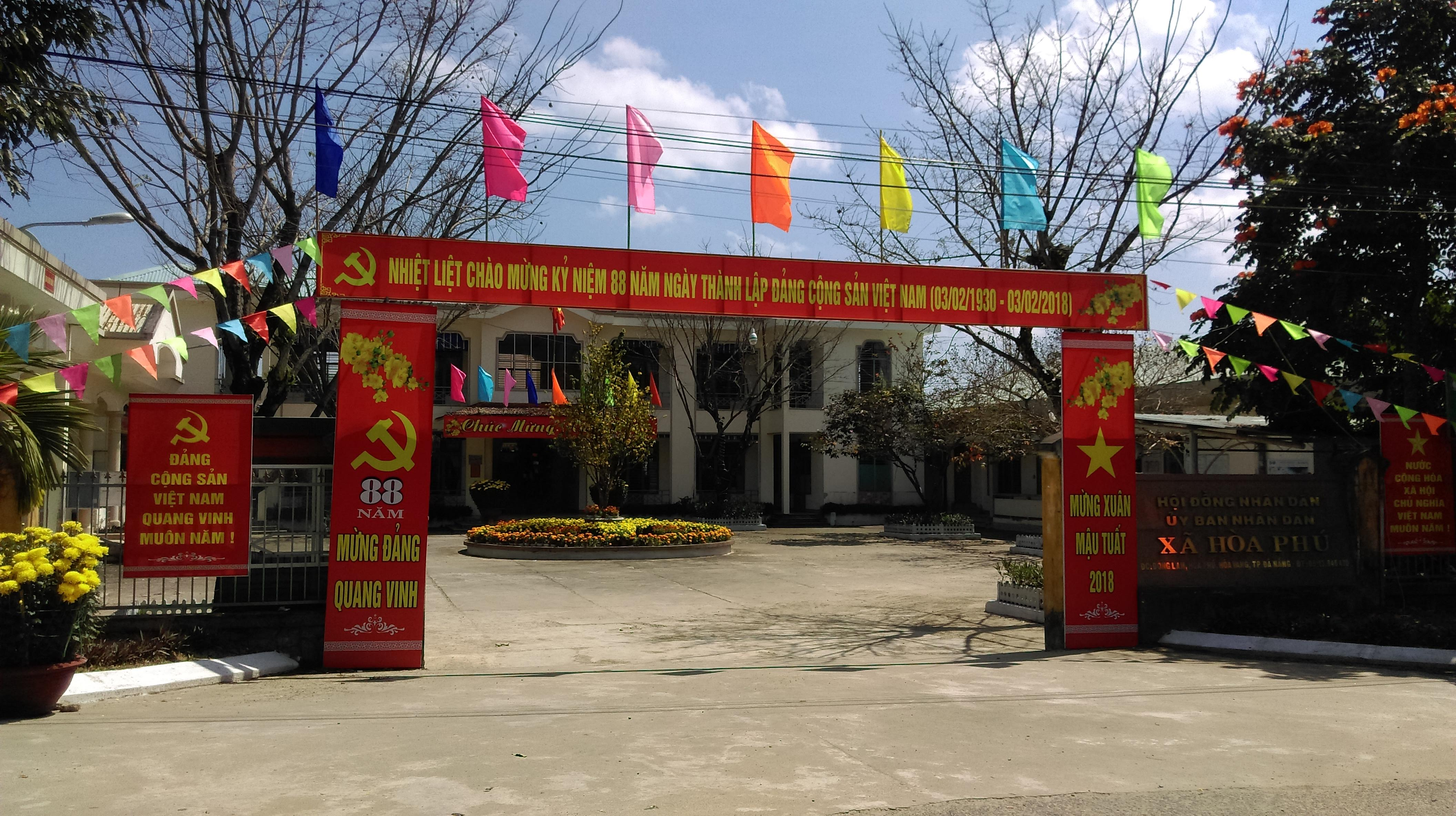 UBND xã Hòa Phú, Hòa Vang, Đà Nẵng 2